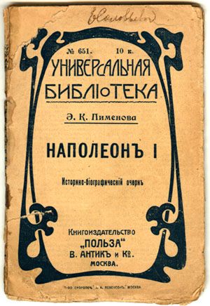 Пименова Эмилия. "Наполеон I"